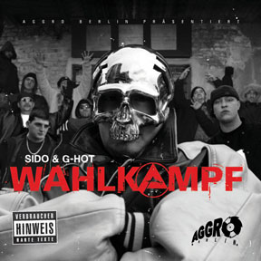 Cover der Single „Wahlkampf“